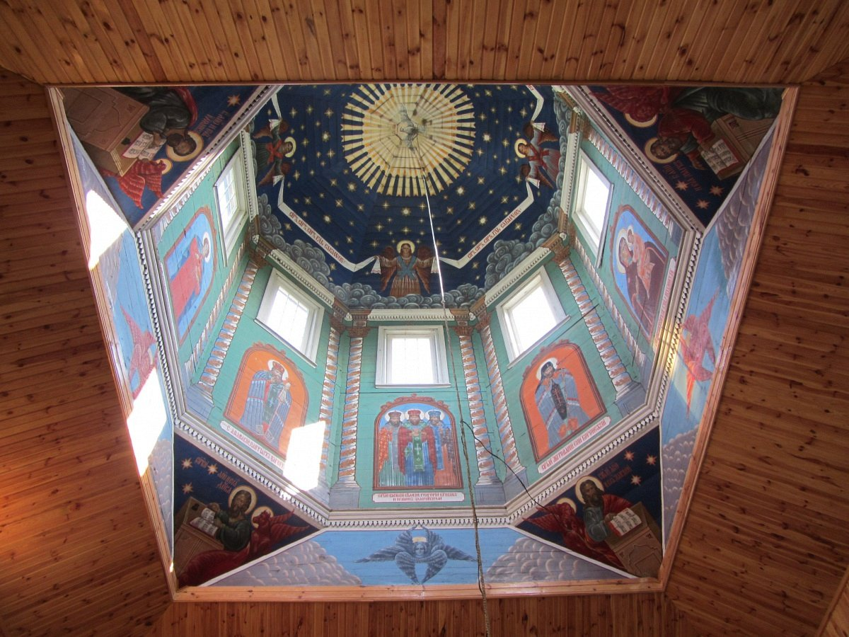 Глыбоцкае. Свята-Раства-Багародзіцкая царква